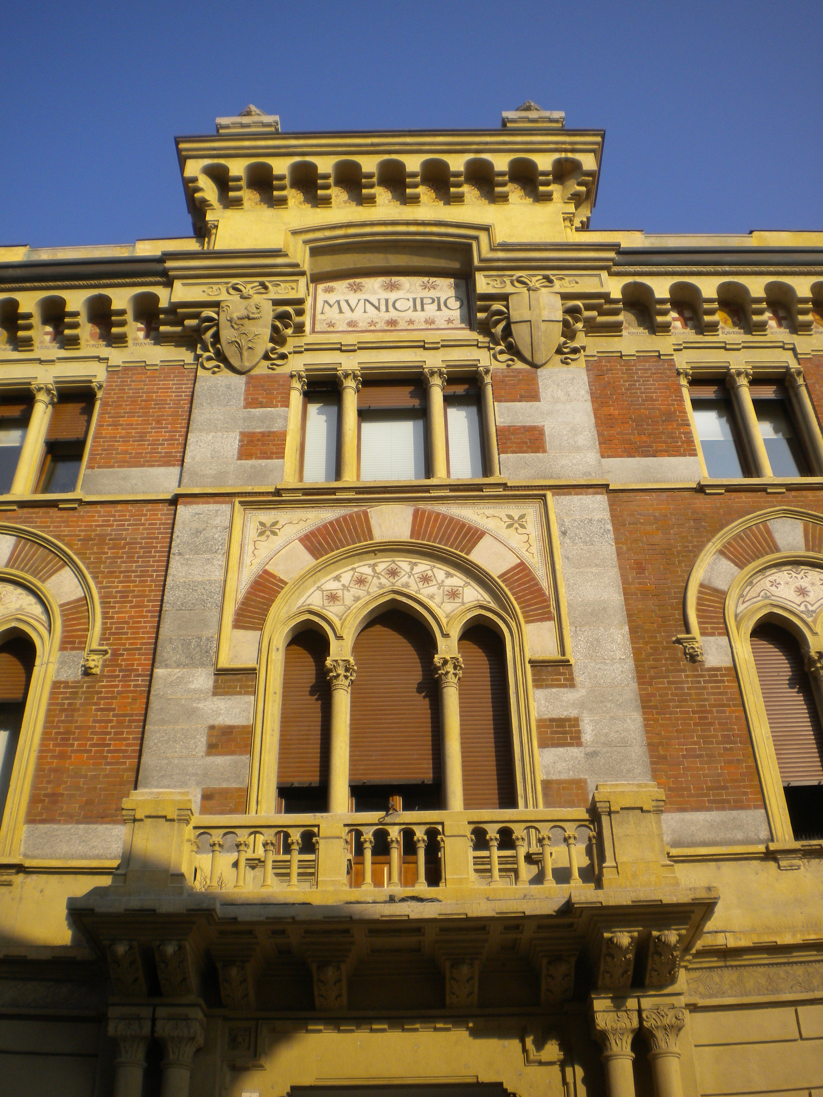 Palazzo Malinverni This is a photo of a monument which is part of cultural heritage of Italy.